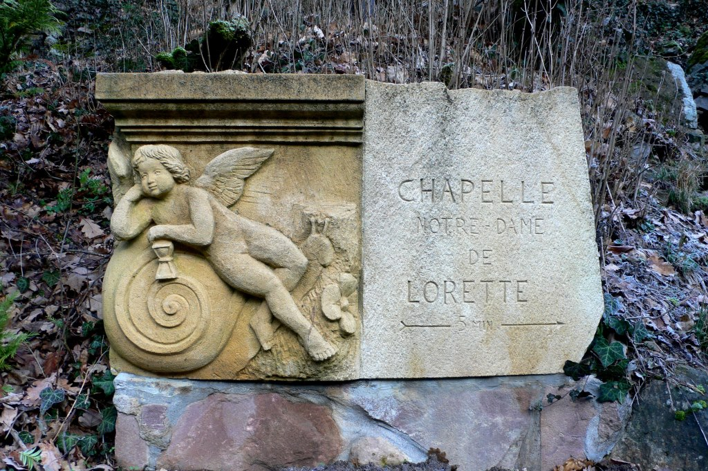 Puto und Schnecke mit Wegweiser zur Lorettokapelle in Murbach (Elsass)